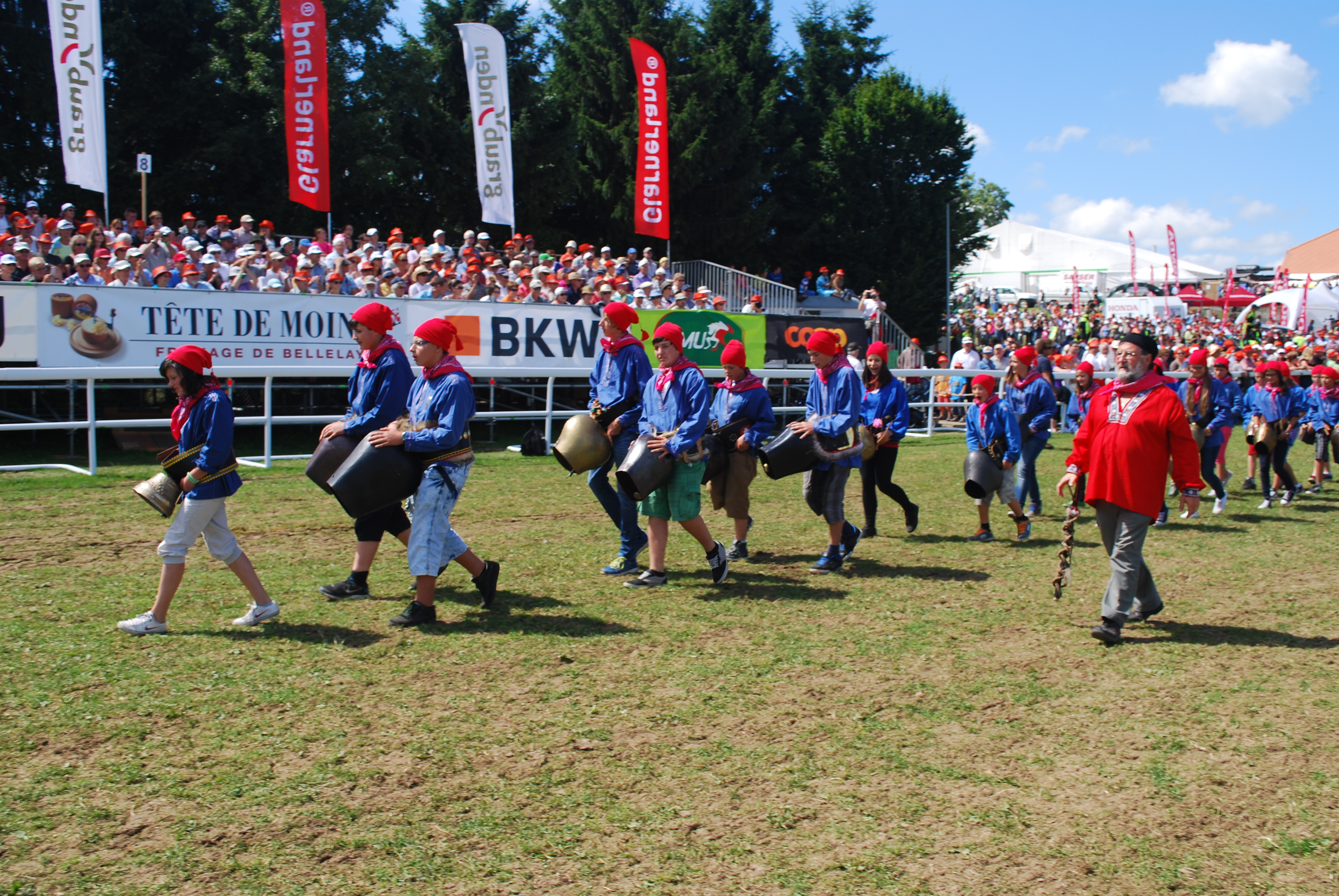 Schulkinder aus Mustair präsentieren den Brauch des Chalandamarz am Marché-Concours in Saignelégier. Die Kinder ziehen dabei mit den Kuhglocken durch die Gassen.